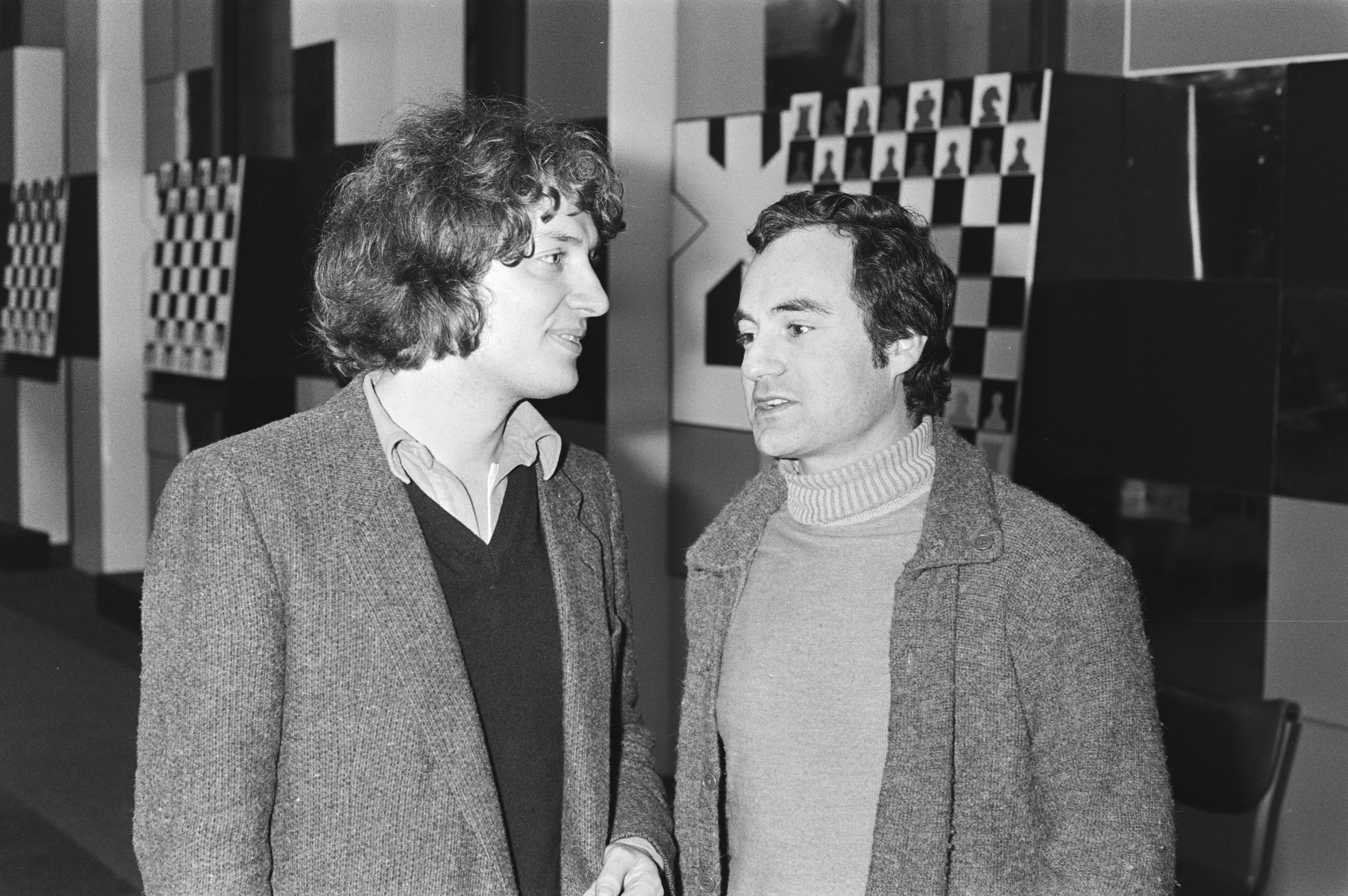 Collectie / Archief : Fotocollectie Anefo Reportage / Serie : [ onbekend ] Beschrijving : V.l.n.r. Jan Timmen en Genna Sosonko in gesprek tijdens het 43e Hoogovenschaaktoernooi Datum : 27 januari 1981 Trefwoorden : schaken, toernooien Persoonsnaam : Sosonko, Genna, Timman, Jan Instellingsnaam : Hoogovenschaaktoernooi Fotograaf : Antonisse, Marcel / Anefo, [onbekend] Auteursrechthebbende : Nationaal Archief Materiaalsoort : Negatief (zwart/wit) Nummer archiefinventaris : bekijk toegang 2.24.01.05 Bestanddeelnummer : 931-2862